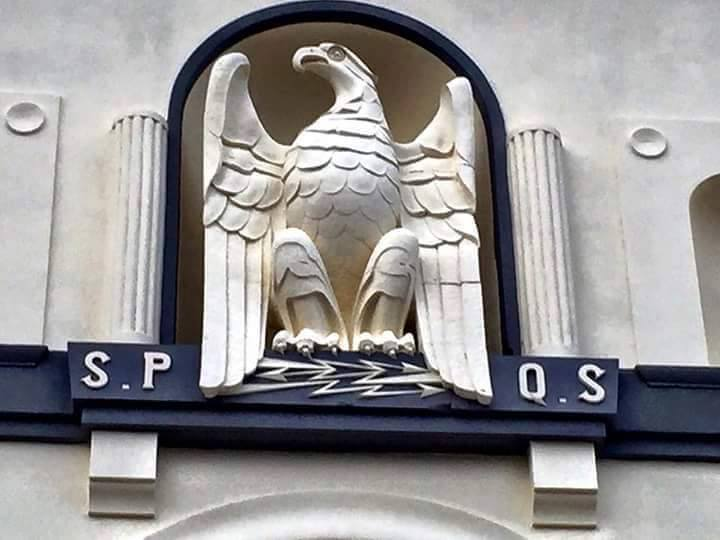 RETRO TRIBUNA APPENA RISTRUTTURATO!